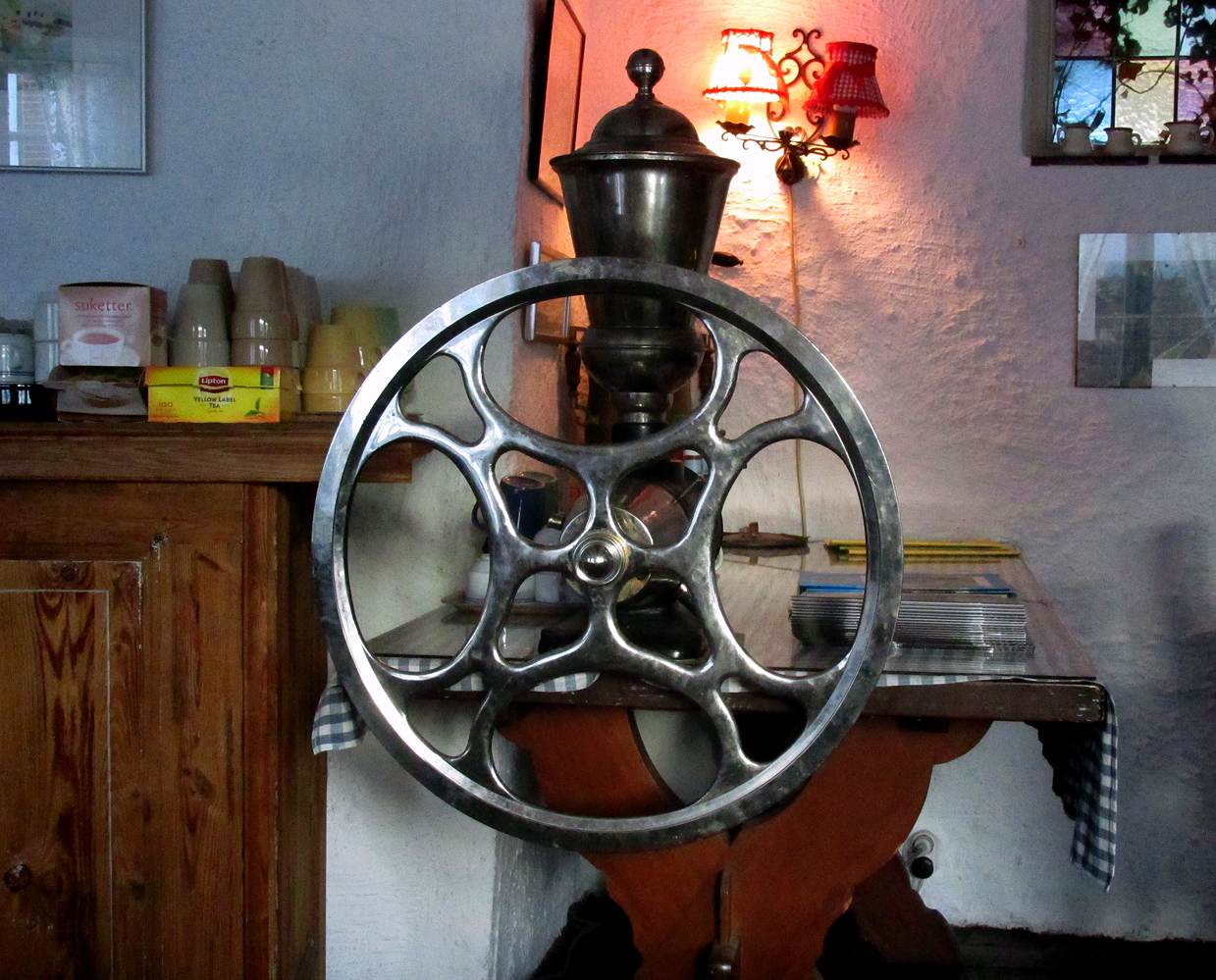 En elektrisk kaffekvarn med svänghjul. Pilgrändens Wärdshus i Ystad 2016.